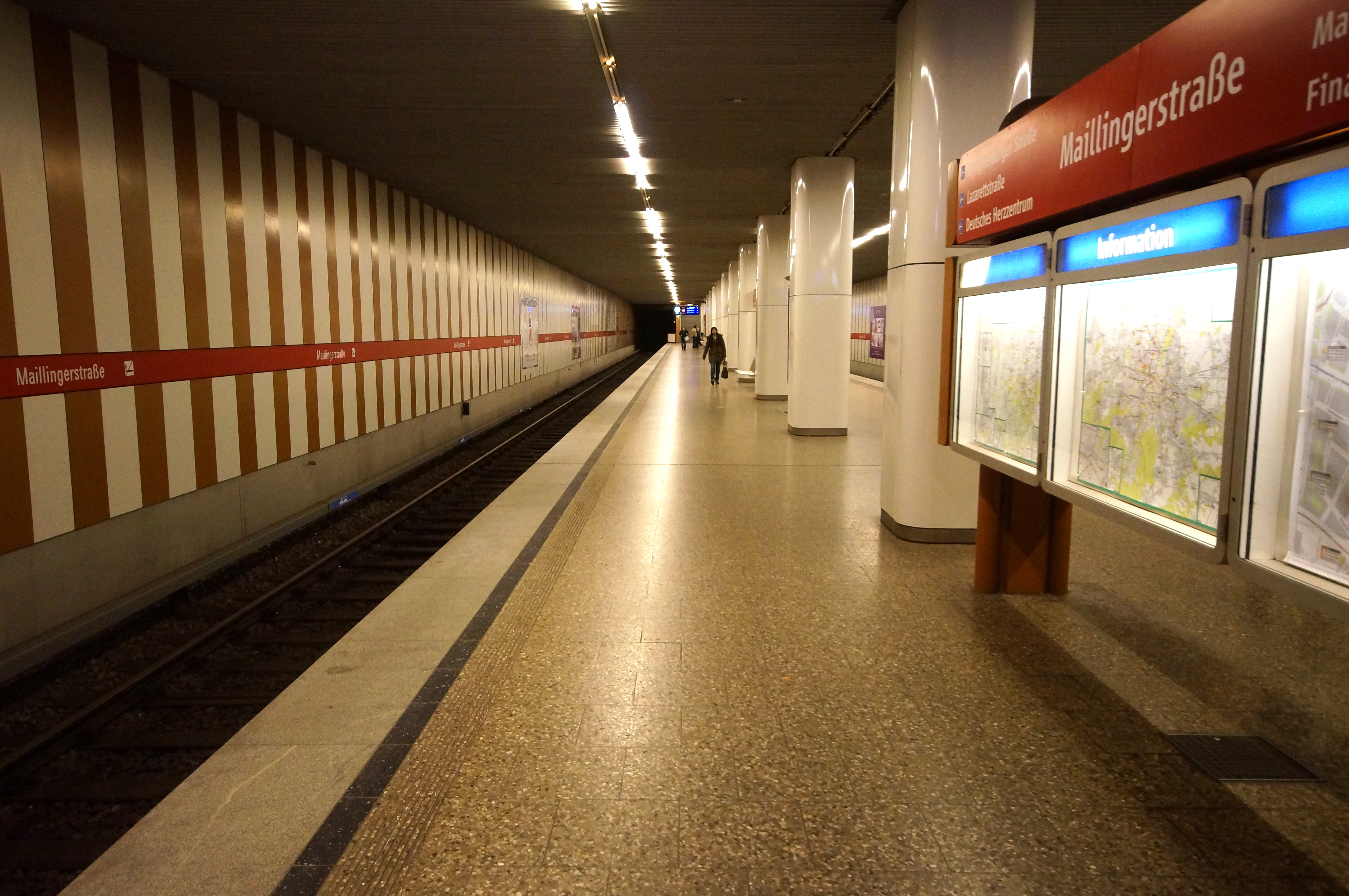 Der U-Bahnhof Maillingerstraße der Linien U 1 und U 7 der Münchner U-Bahn.